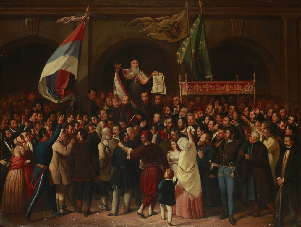 Serbian May assembly in Karlovci in May 1848. Majska skupština Srba u Karlovcima u maju 1848. godine.